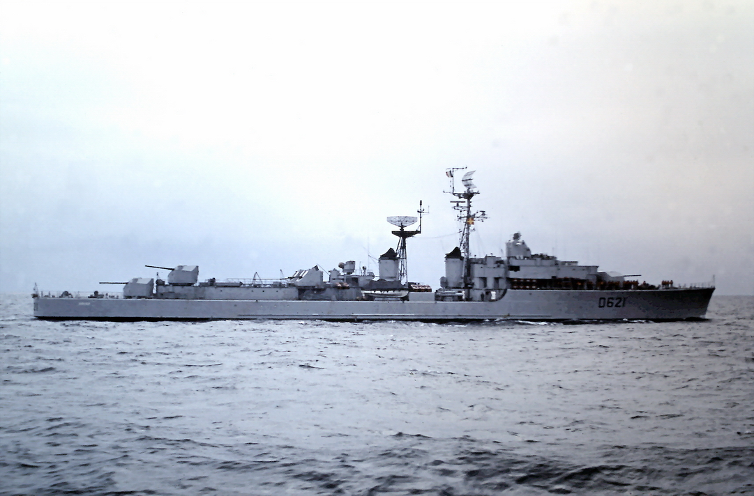 Escorteur d'escadre Surcouf D621 en 1970, quelques mois avant son abordage